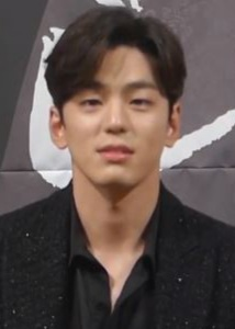 12일 오후 서울시 강남구 논현동 임피리얼팰리스서울에서 TV CHOSUN 특별기획 드라마 '간택-여인들의 전쟁' 제작발표회가 열려 배우 진세연 김민규 도상우 이열음 이시언이 참석해 기자들의 질문에 답변하고 있다.